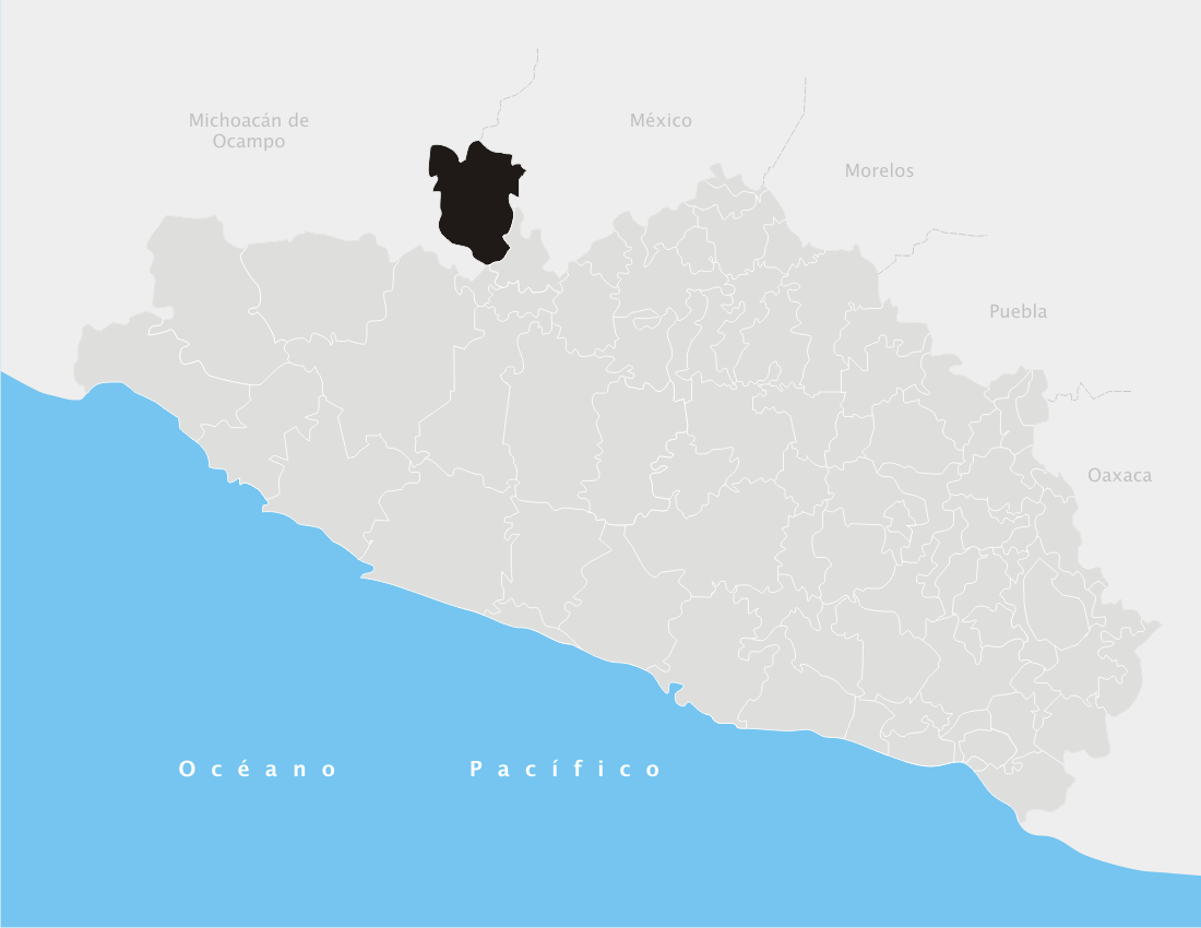 Cutzamala de Pinzón en el estado de Guerrero (México)